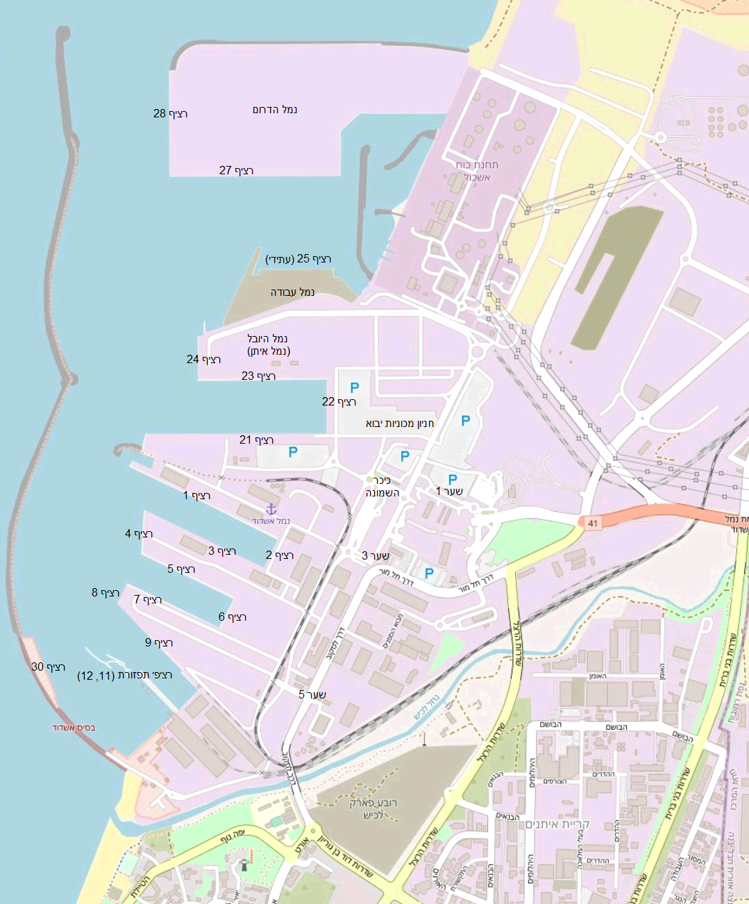 מפת נמל אשדוד